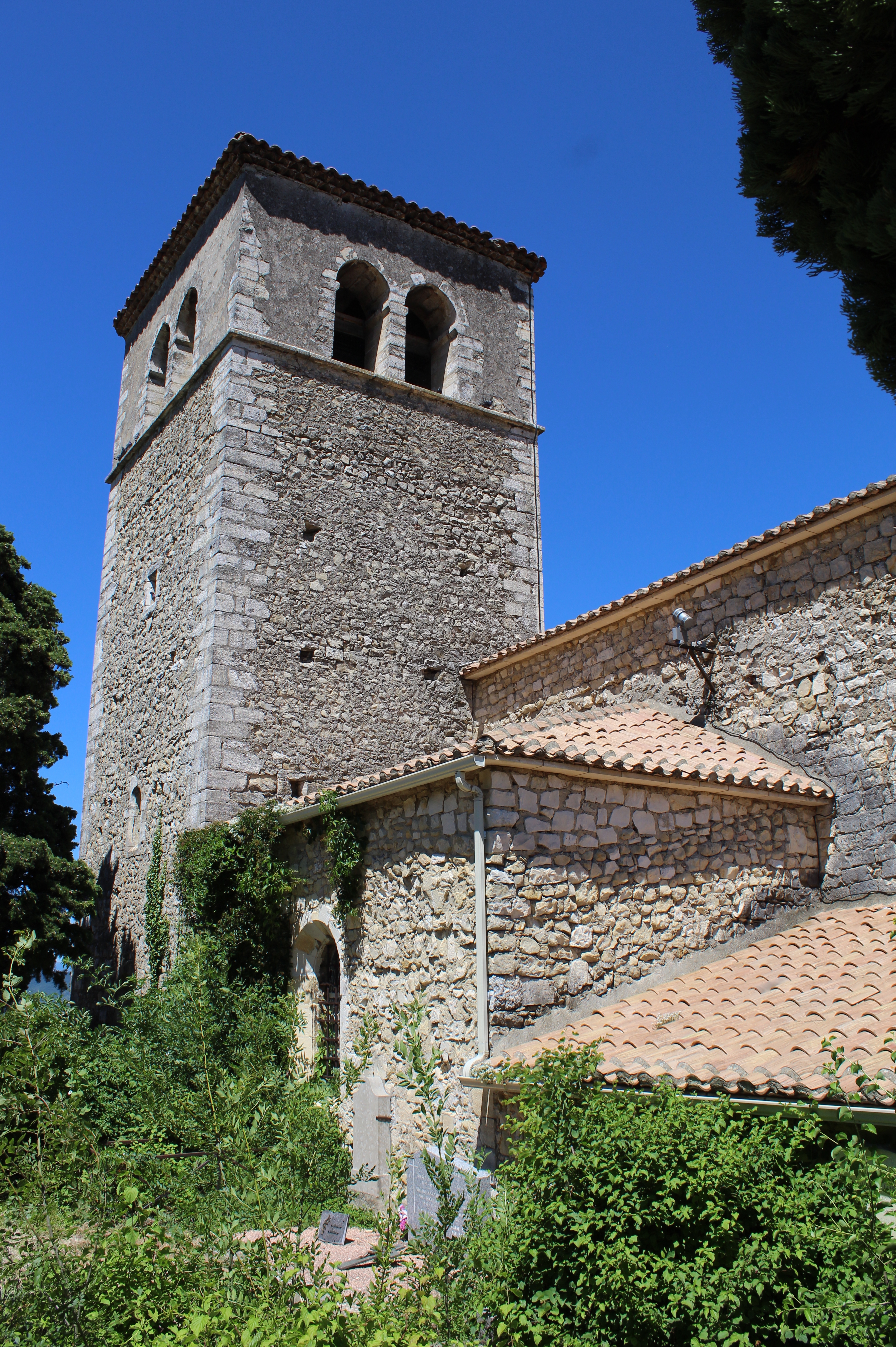 Eglise Sainte-Foy